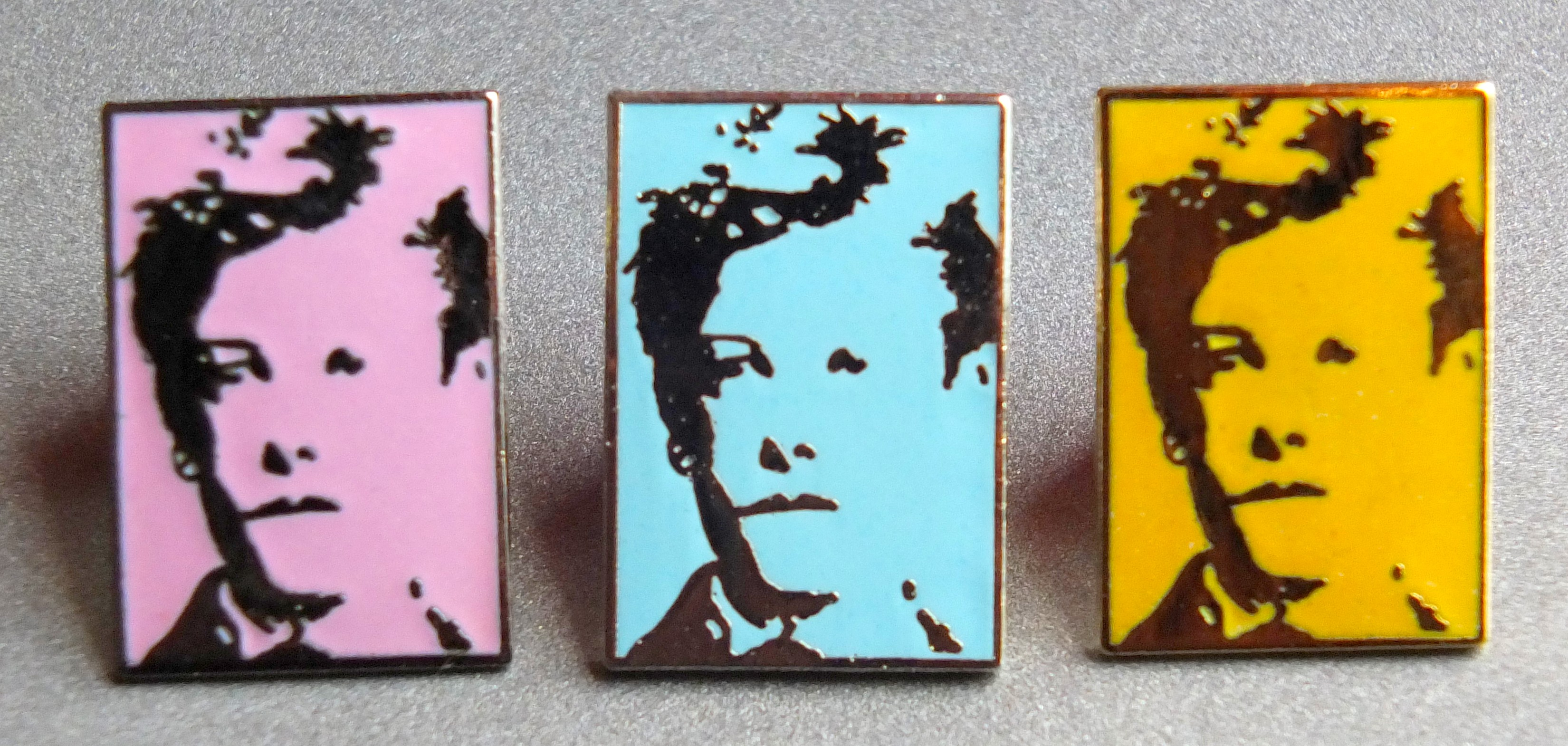 Trois pin's en métal reprenant la célèbre photo de Carjat (hauteur 2,2 cm). Date inconnue, non signés, collection personnelle.